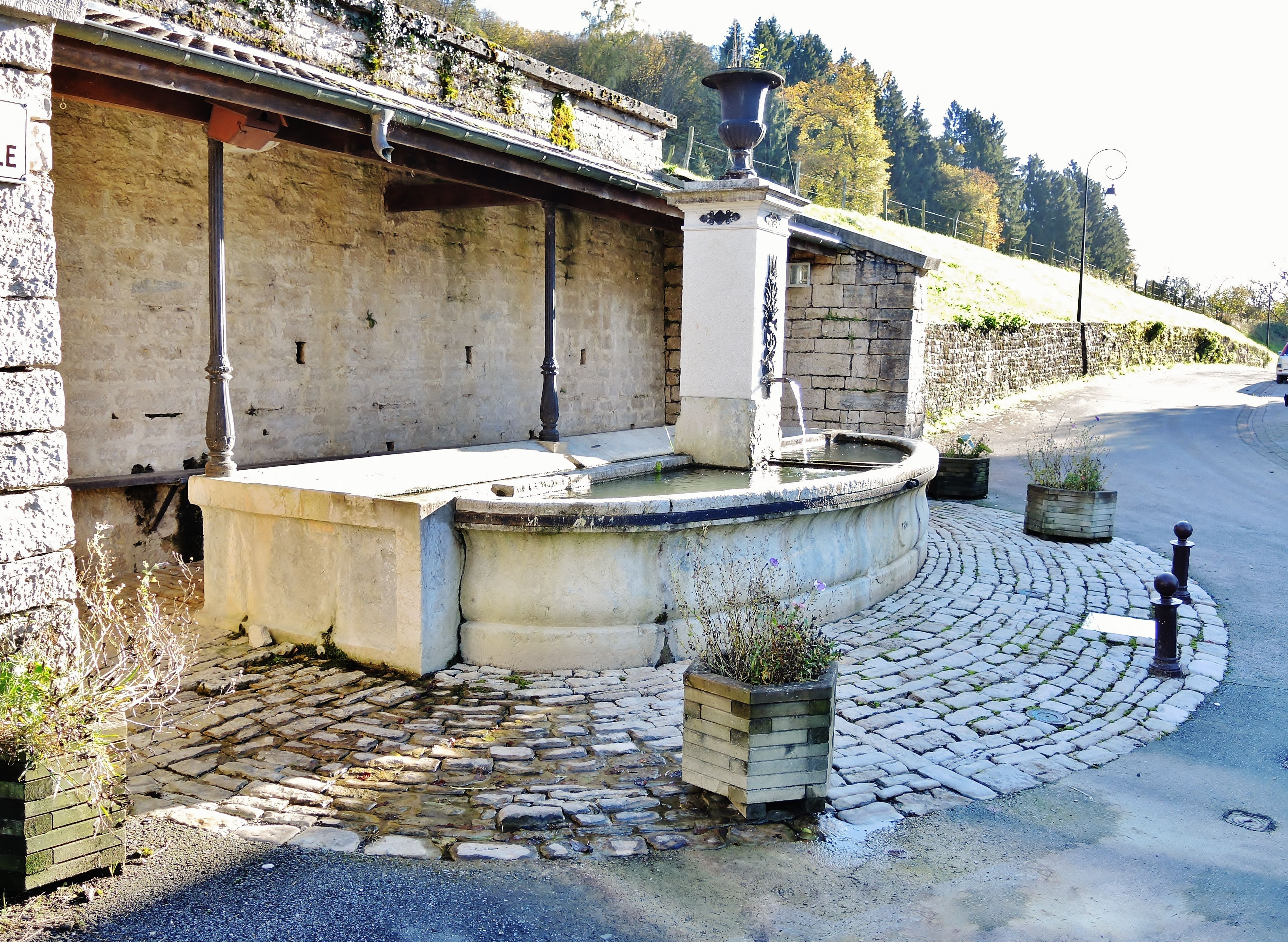 Fontaine, rue des remparts. Beutal. Doubs.